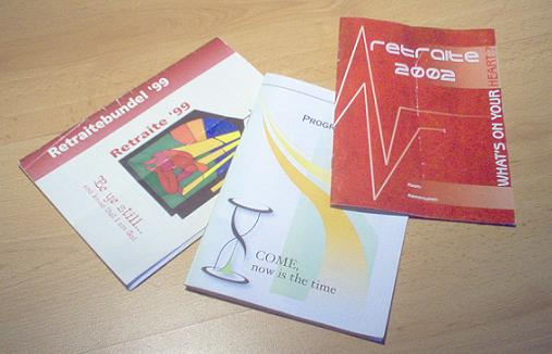 Zojuist zelf gefotografeerde programmaboekjes van de Ichthusretraite, om het artikel over ichthus (studentenvereniging) wat op te leuken.